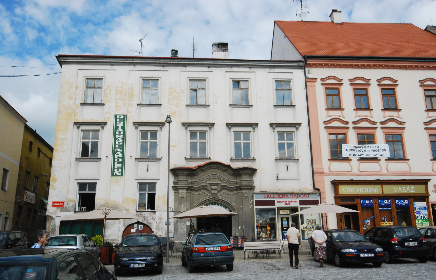 Das Palais Ugart auf dem Horní náměstí in Znojmo